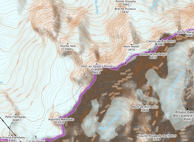 carte réalisée sur umap This map may be incomplete, and may contain errors. Don't rely solely on it for navigation.